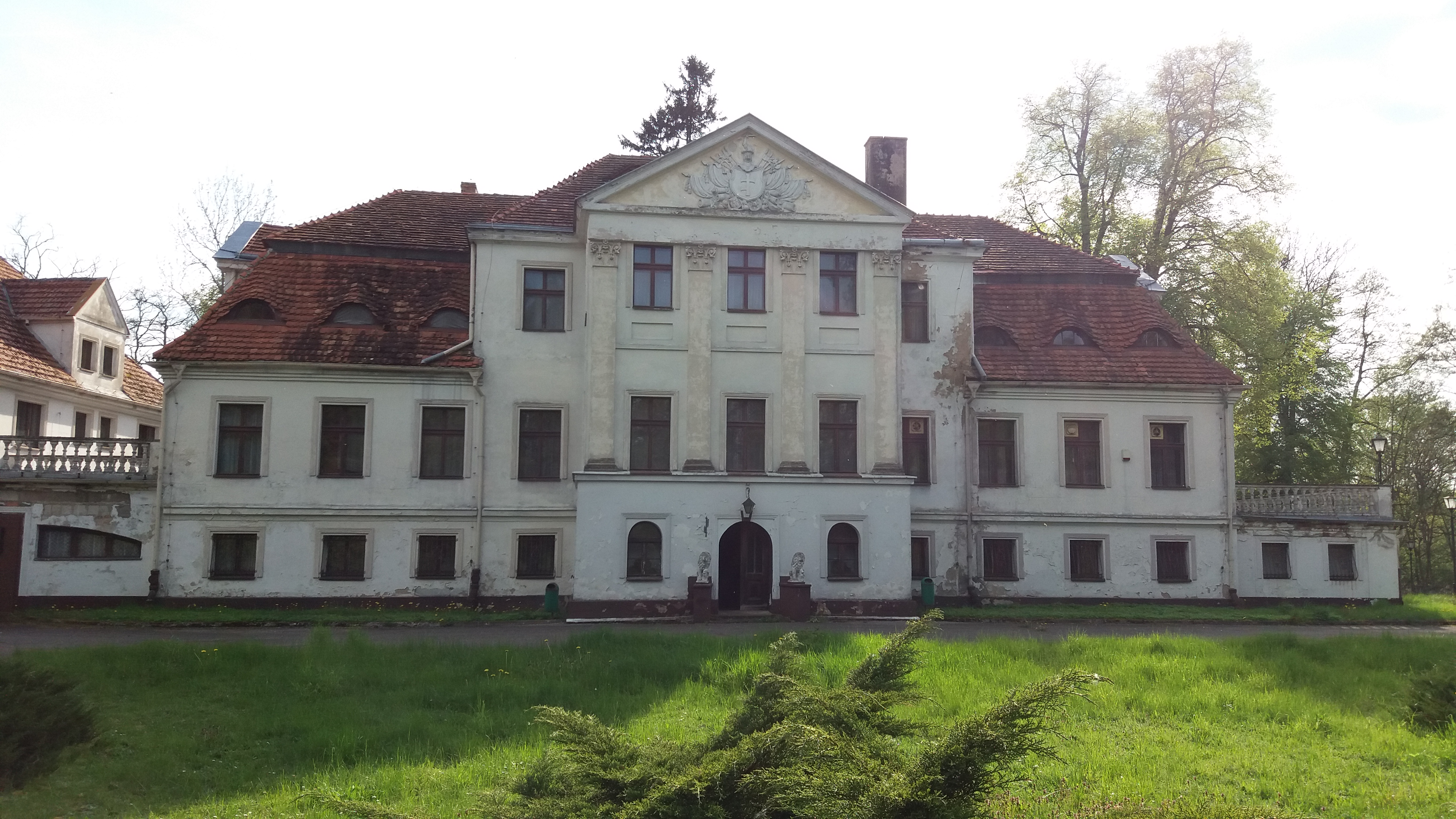 Pałac w Zajączkowie